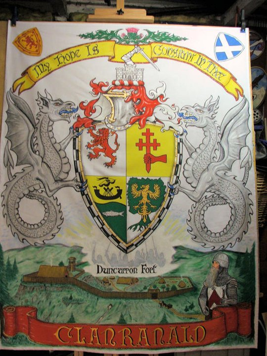 Flagge des mittelalterlichen schottischen Dorfes Duncarron - mit Wappen der MacDonalds of Clanranald